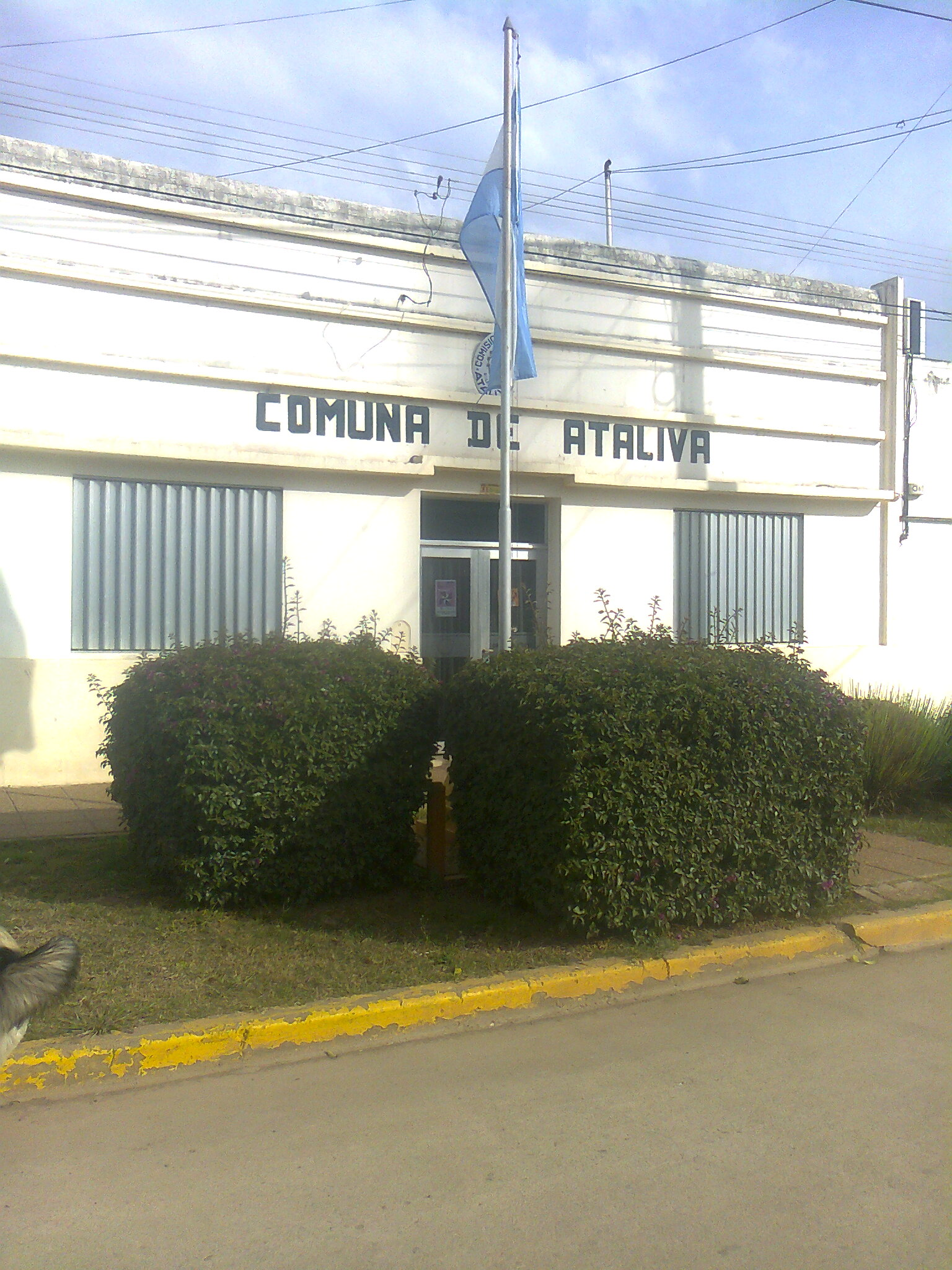 Vista del frente de la Comuna de Ataliva.